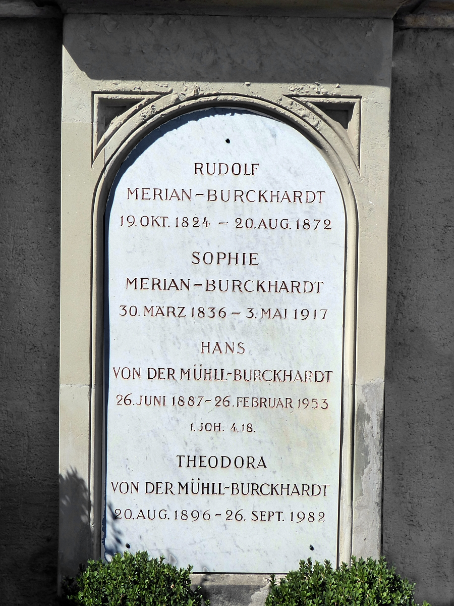 Hans von der Mühll, 1887-1953, Grab auf dem Friedhof Wolfgottesacker, Basel